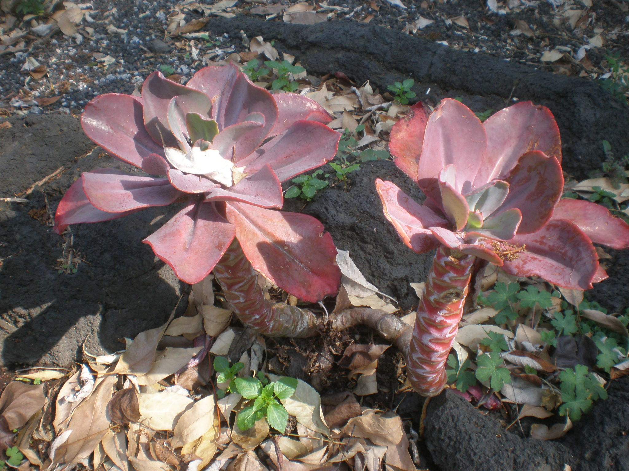 Jardín Botánico de la UNAM, México D.F.